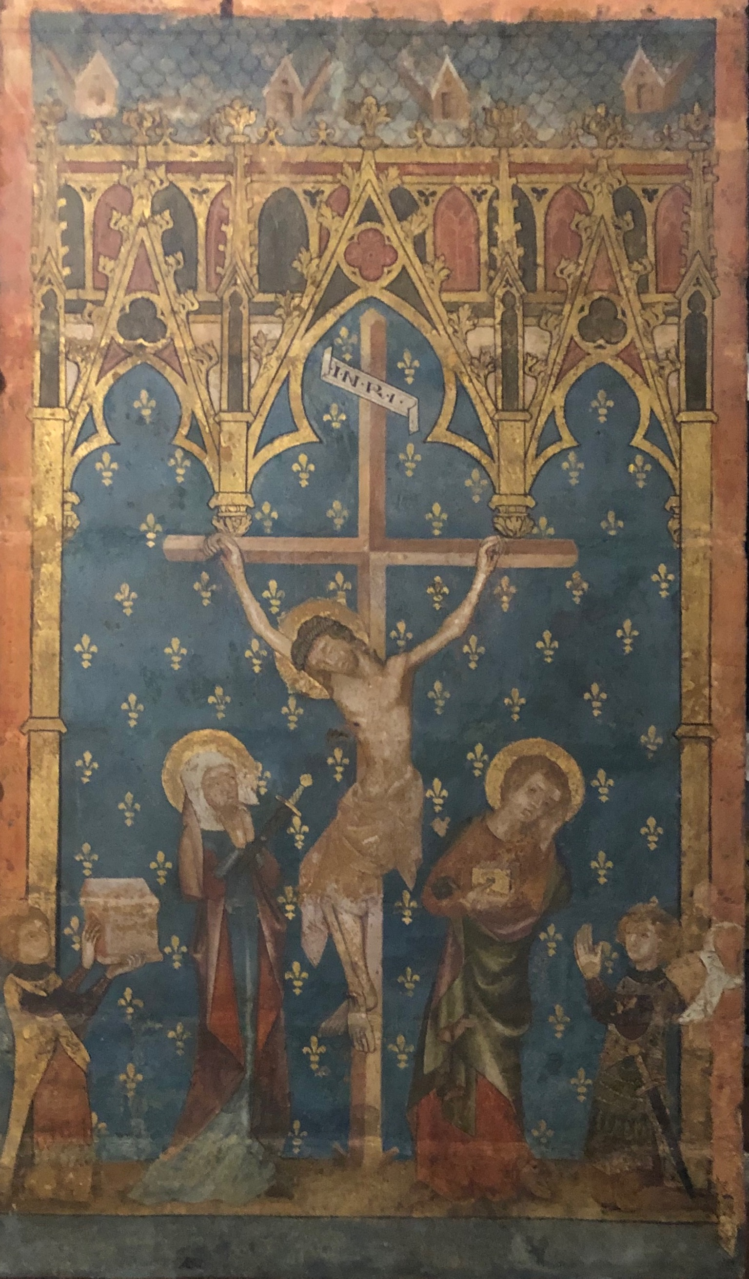 Kreuzigungsbild in St. Potentinus, Steinfeld, Eifel